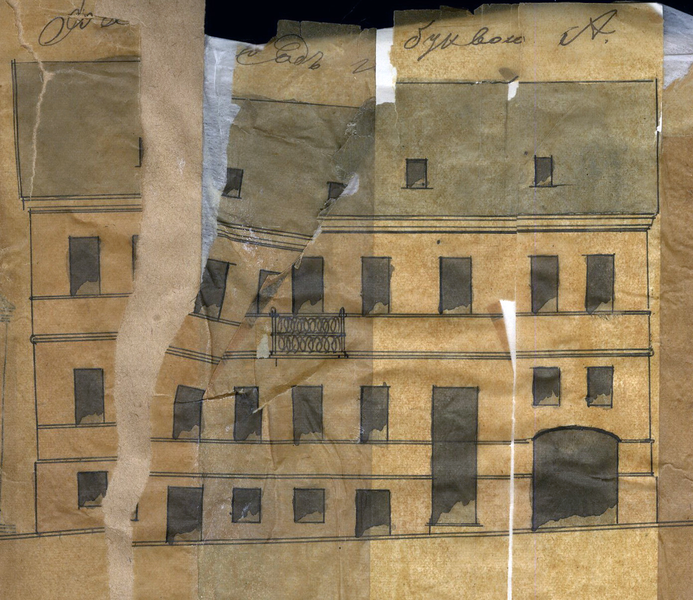 Беларуская (тарашкевіца): Менск (Miensk), вуліца Койданаўская (vulica Kojdanaŭskaja). Дом Гурвіча (Hurvič)